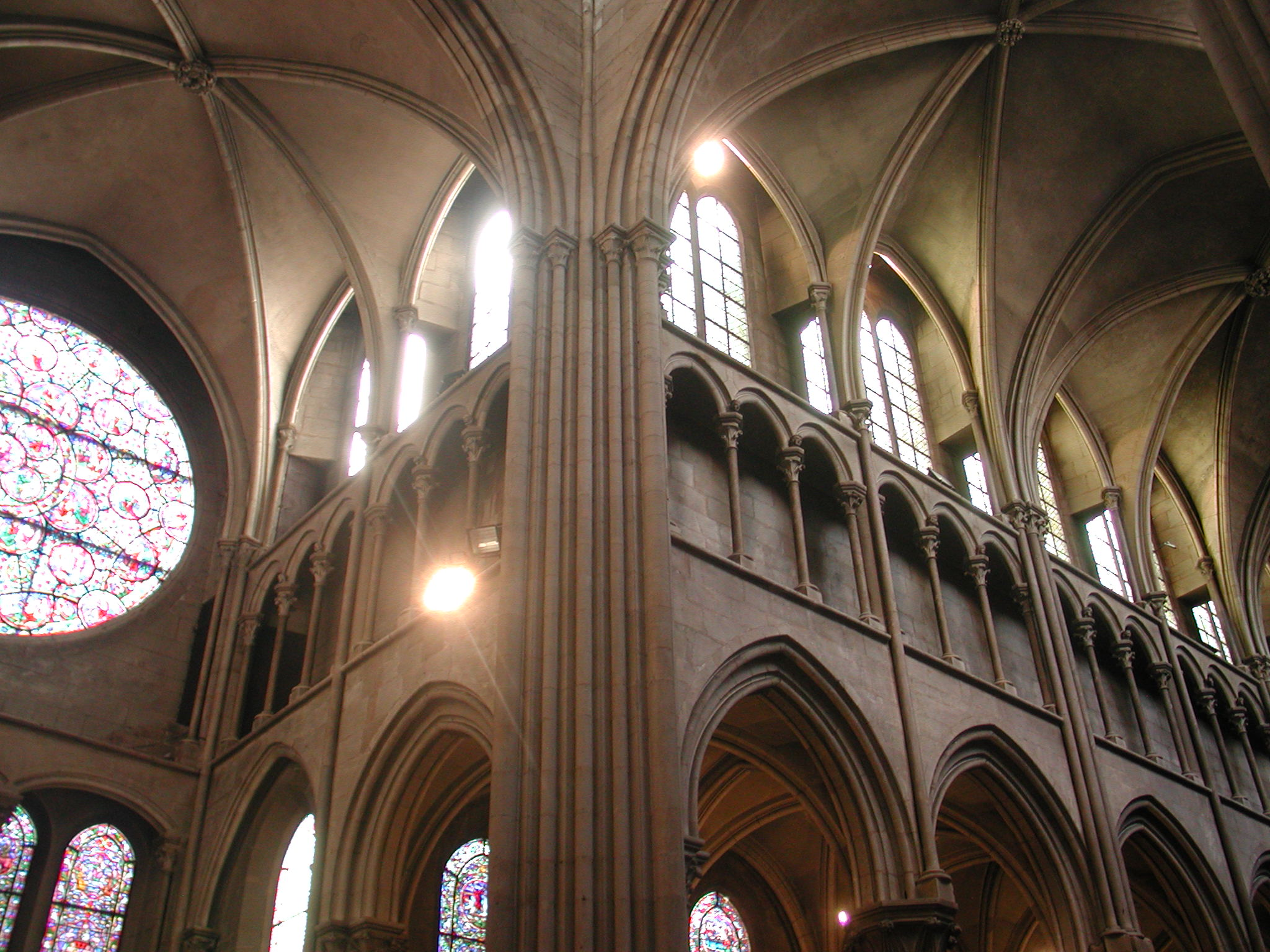 dijon, France